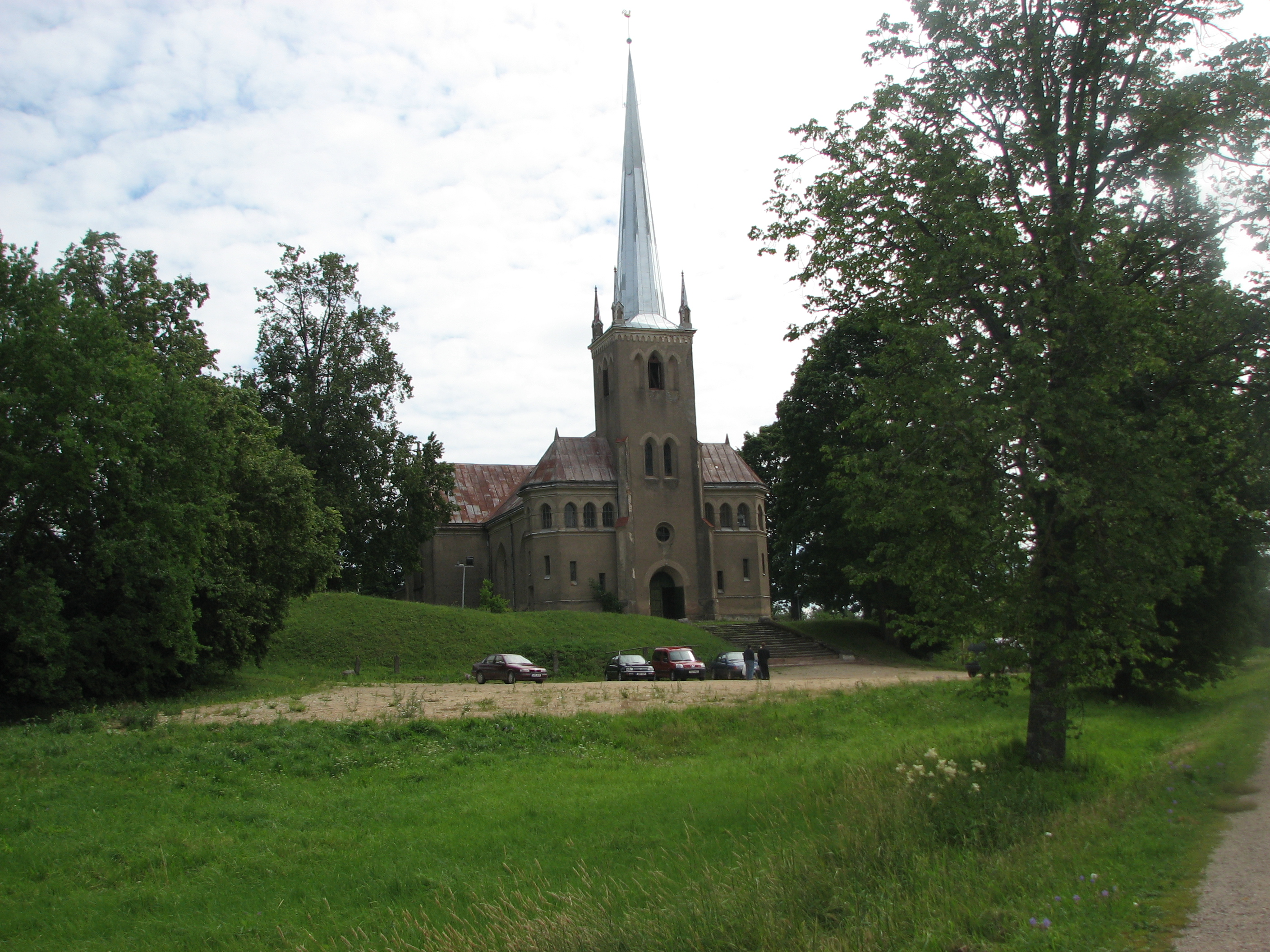 Rõngu kirik.